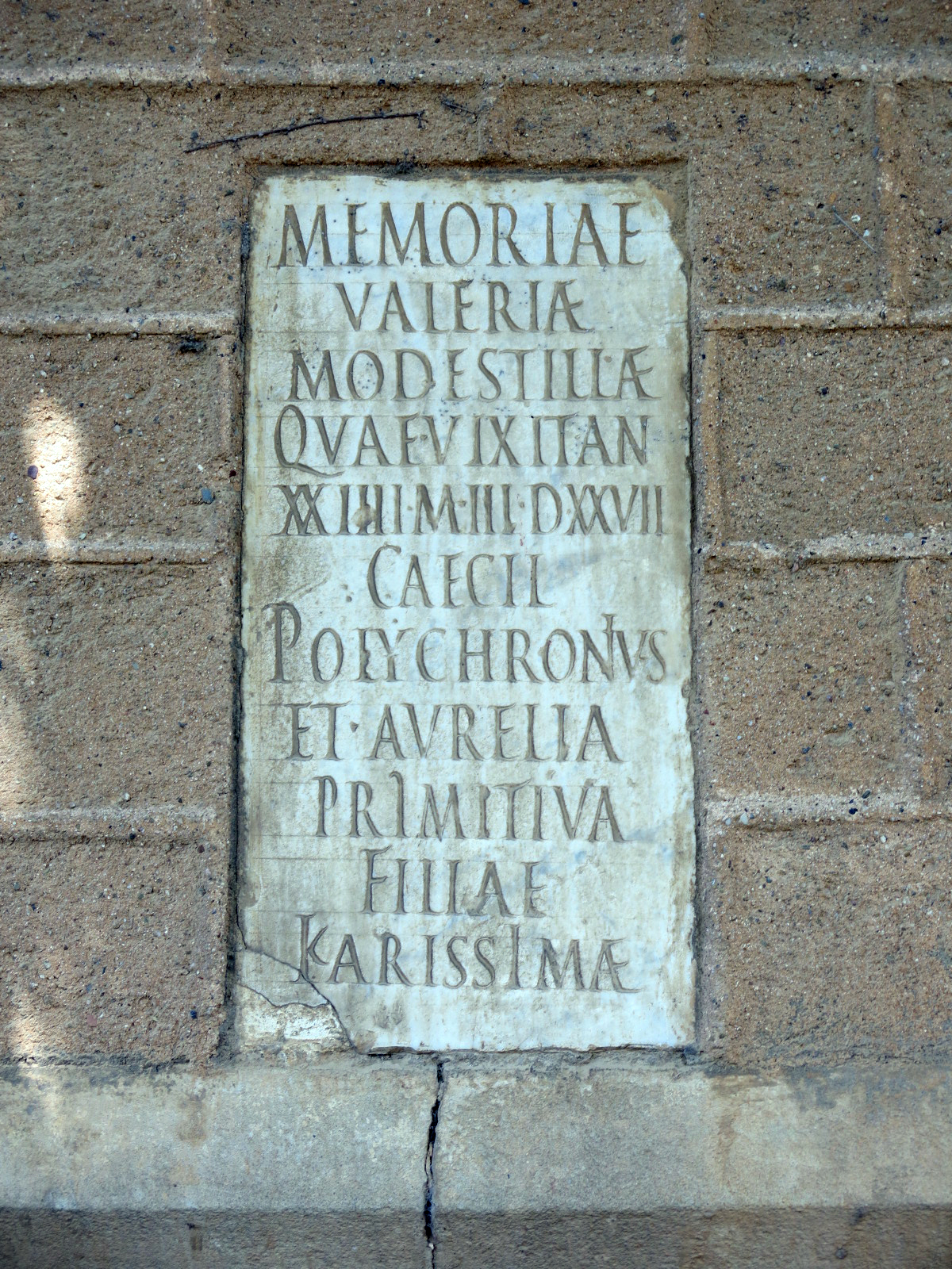 Torre Pallaresa (Santa Coloma de Gramenet)